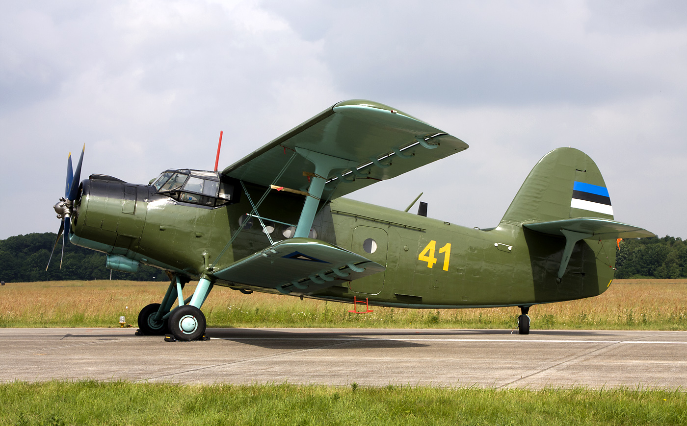 Estonian An-2 at Volkel in 2013.